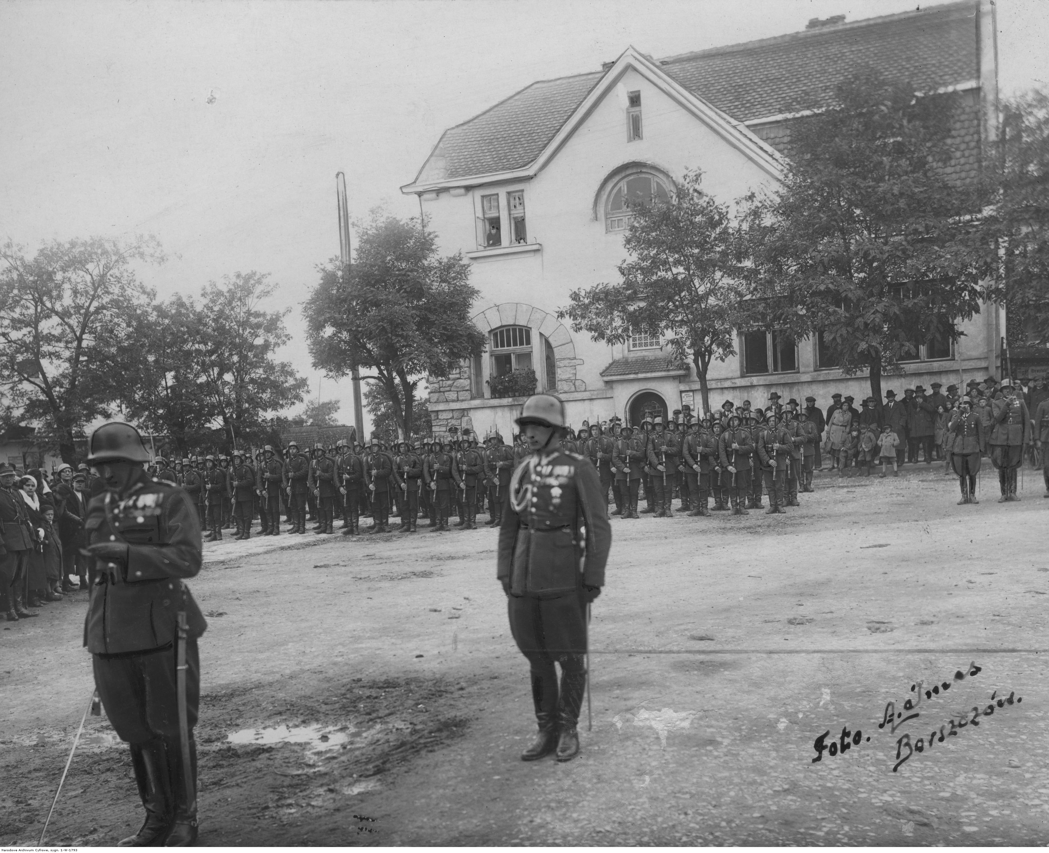 Uroczystość X-lecia istnienia Korpusu Ochrony Pogranicza w Batalionie KOP "Borszczów" w Borszczowie; raport oddziałów. Koncern Ilustrowany Kurier Codzienny - Archiwum Ilustracji